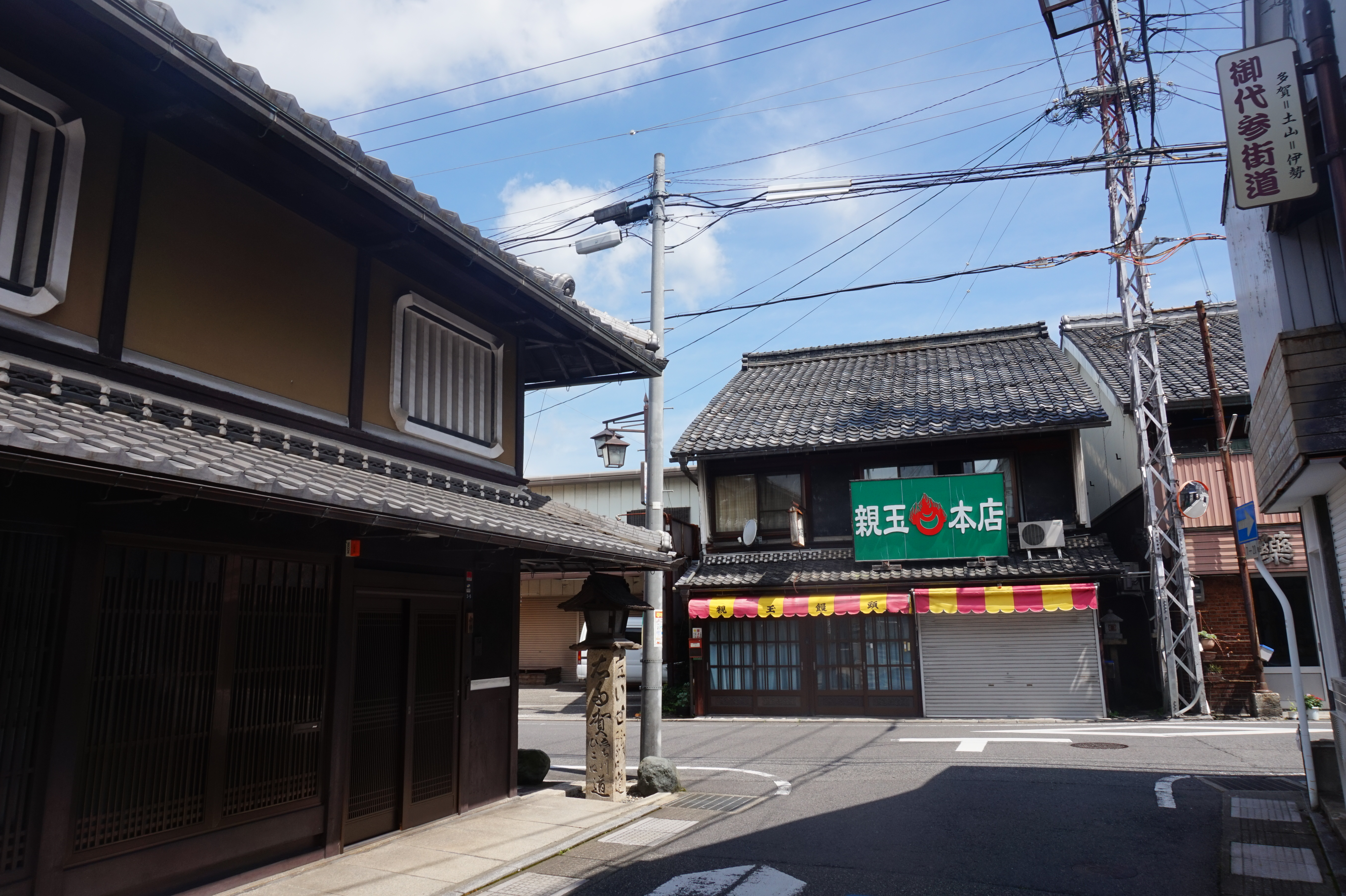 滋賀県東近江市八日市清水1丁目（栄町商店街）付近の旧御代参街道。